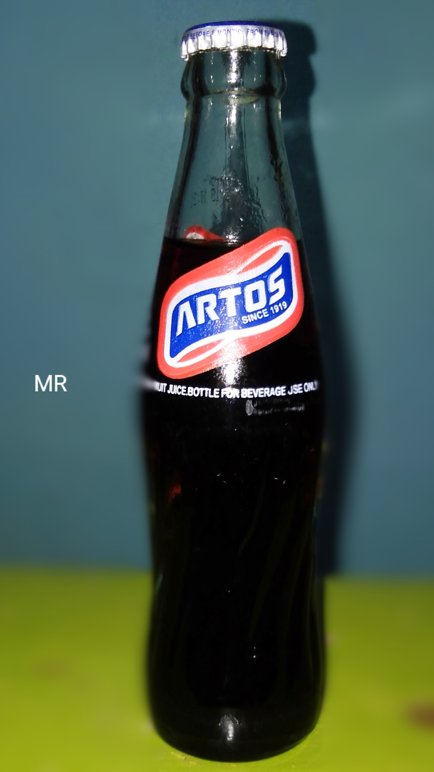 ఆర్టోస్